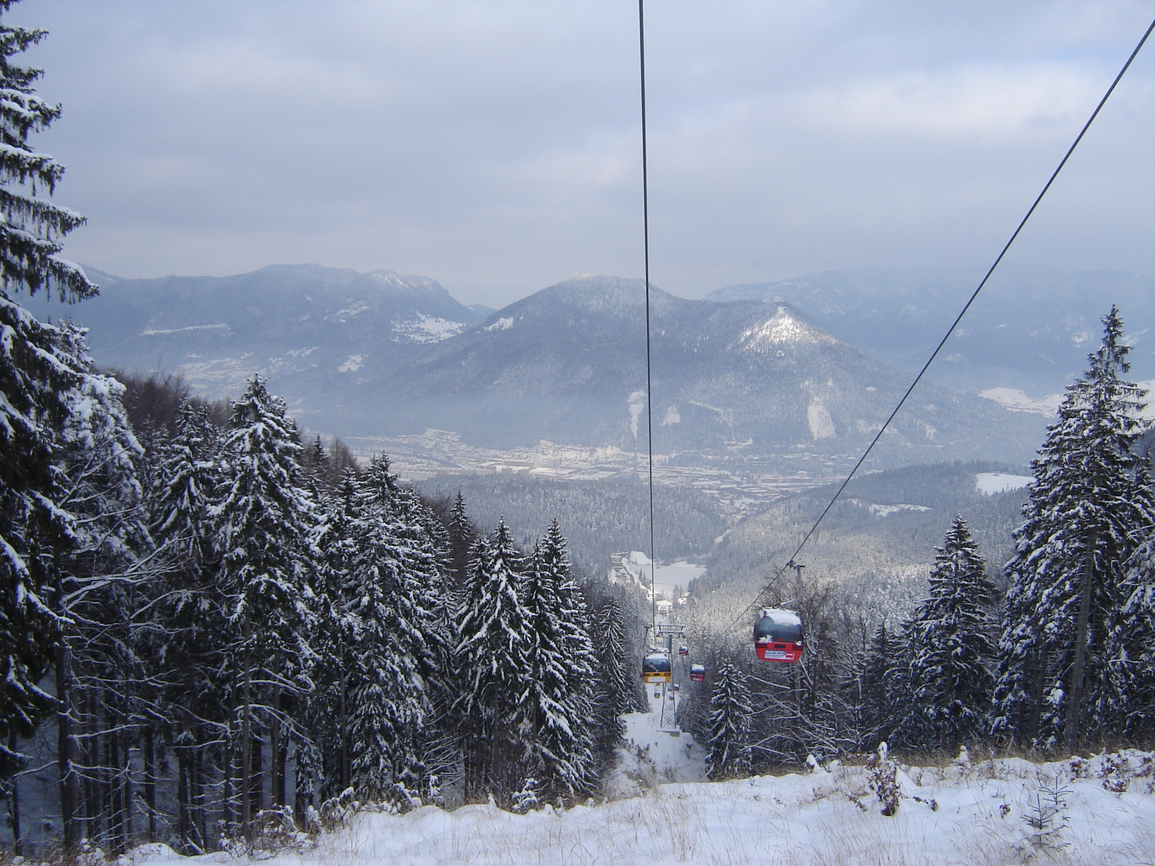 Kabínková lanovka Malinô - Brdo